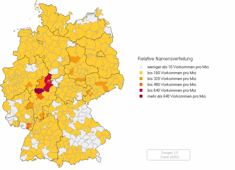 Nameshäufigkeit des Namens Damm